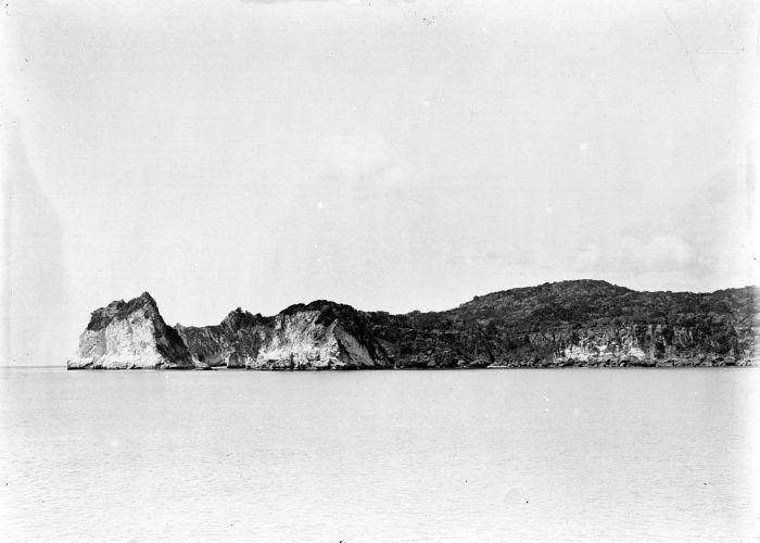 Negatief. Deze foto is gemaakt tijdens de Siboga Expeditie van 1899-1900.. De Noilmina-baai